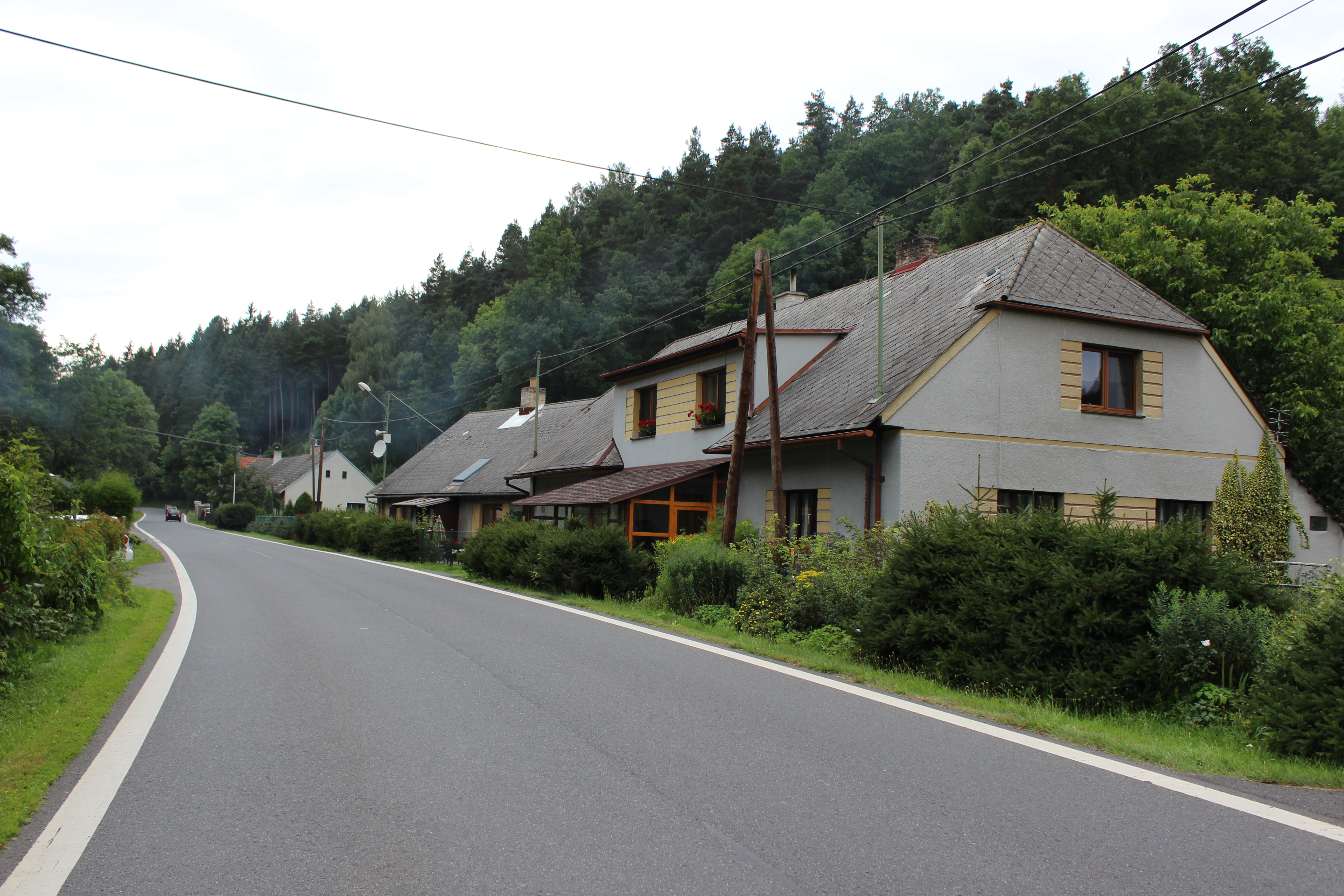 Zástavba podél silnice v Puchverku, části Hrádku.